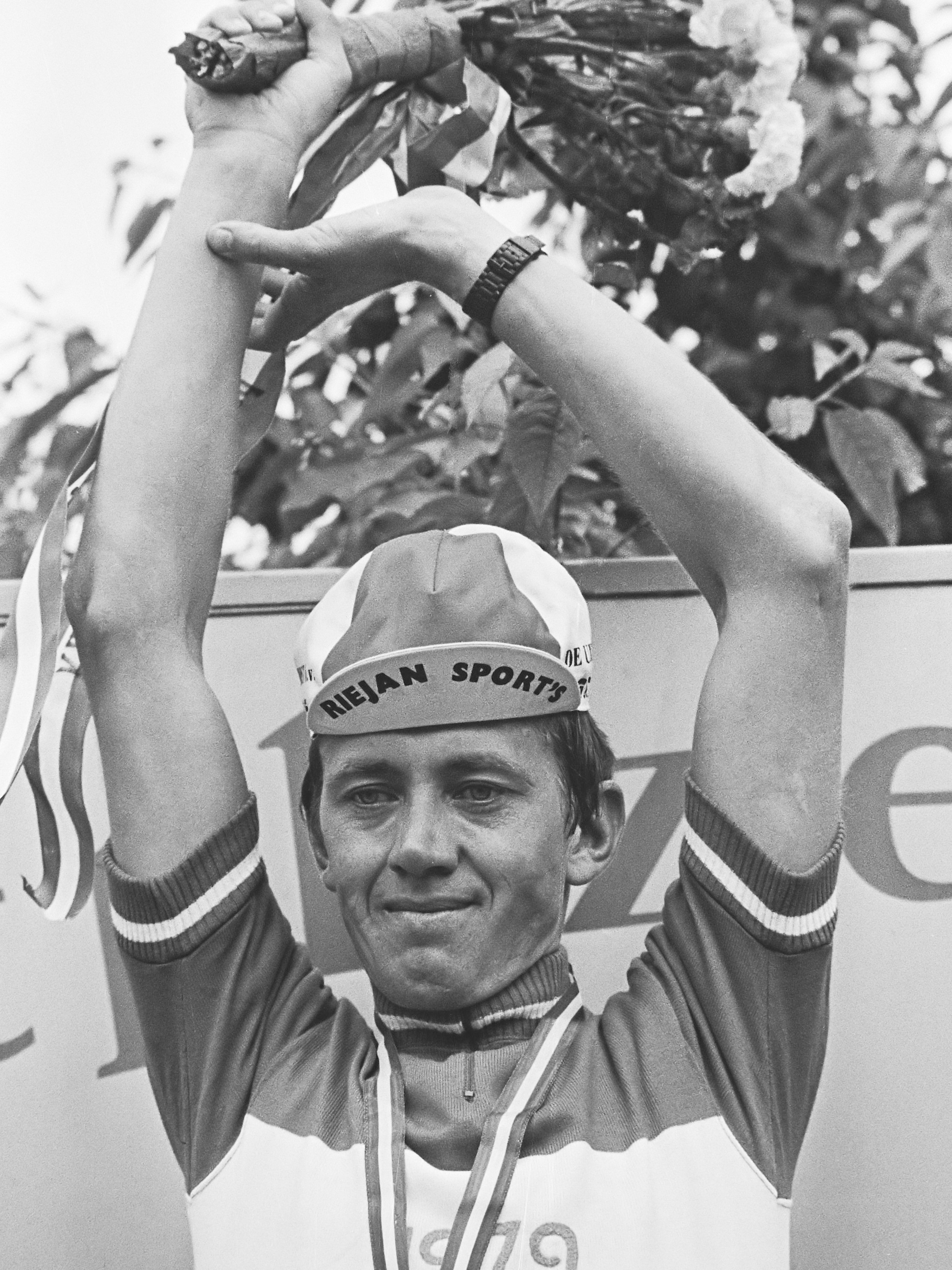 Nederlandse Kampioenschappen Wielrennen Amateurs in Geulle (Limburg); Huldiging Hennie Stamsnijder 23 juni 1979